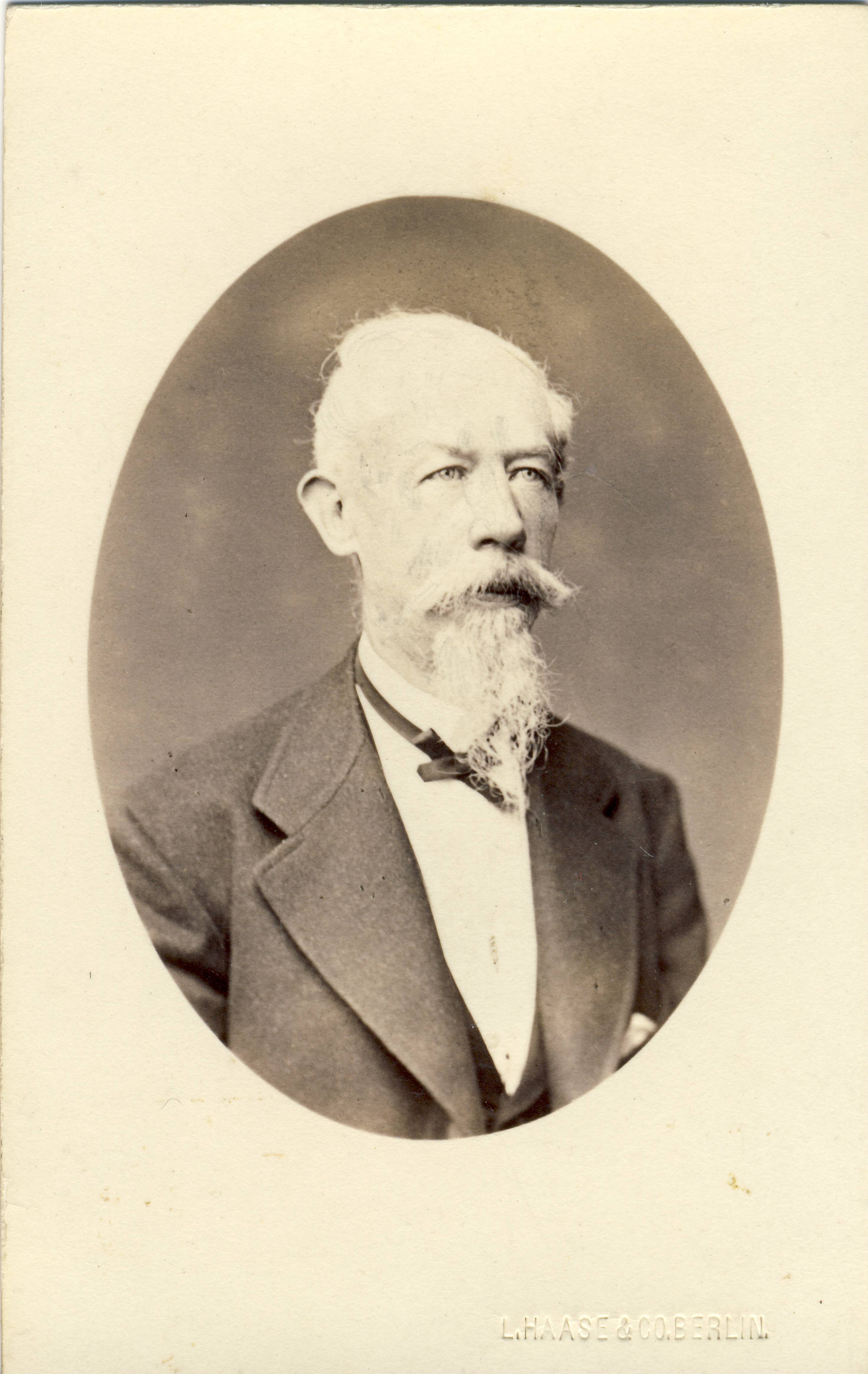 Parun Artur Girard de Soucanton (1813–1884)